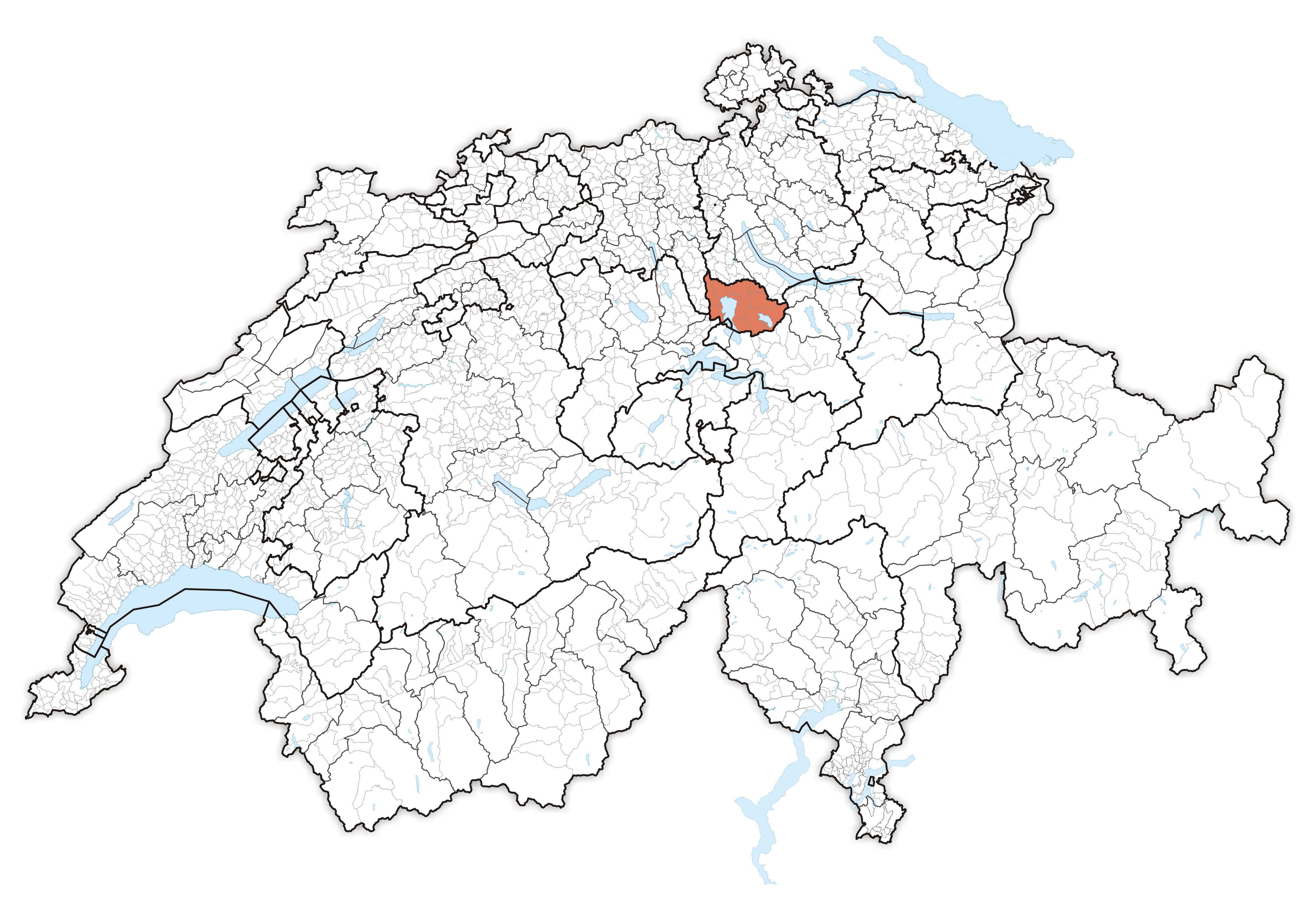 Canton Zug